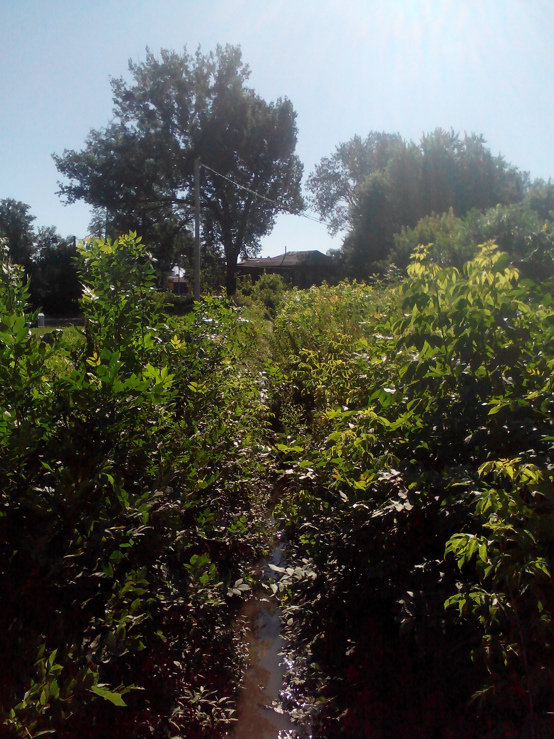 Україна. Харків. Нетеченський бульвар. Річка Нетеча, світлина зроблена в сторону початка бульвару.